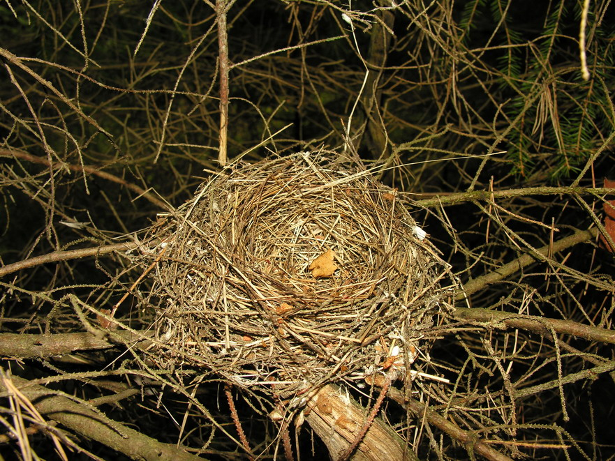 Juodagalvės sniegenos (Pyrrhula pyrrhula) lizdas Foto: Algirdas, 2006 m. rugpjūčio 1 d., Lietuva